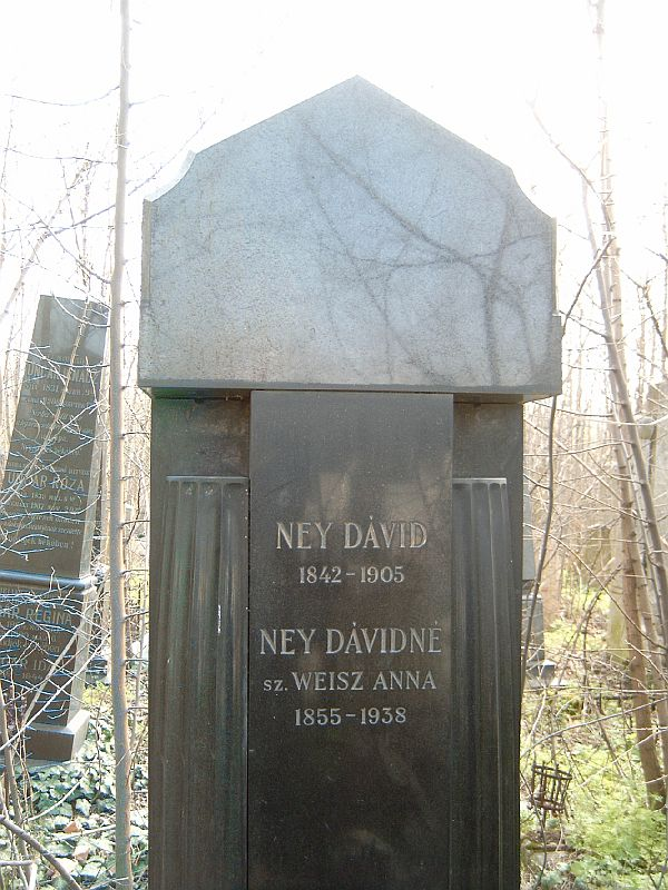 Ney Dávid (Várpalota, 1842. febr. 12. – Bp., 1905. aug. 31.): operaénekes (basszbariton) sírja Budapesten. Kozma utcai izraelita temető: 2-2-14.